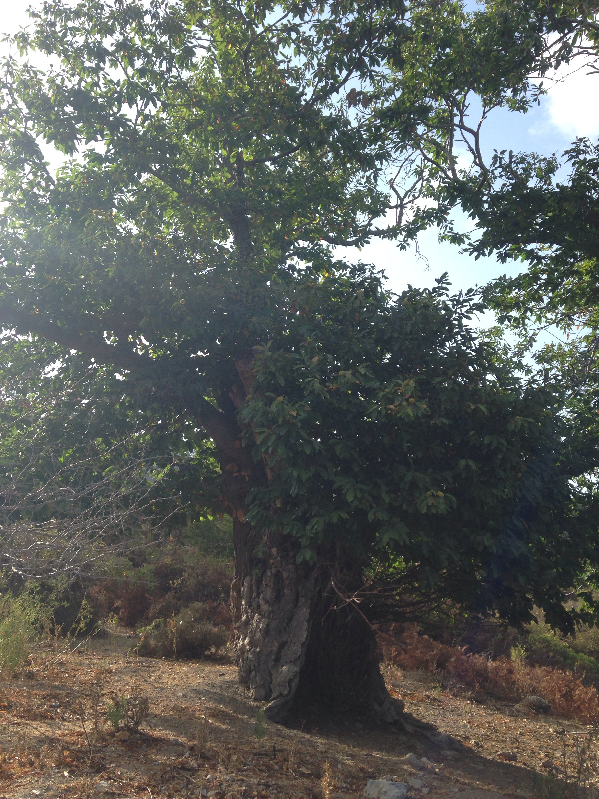 Castane Sativa en Huerta Serrano, Ceuta, España This is a photography of a Special Area of Conservation in Spain with the ID: ES6310001. Natura2000 entry, EEA entry